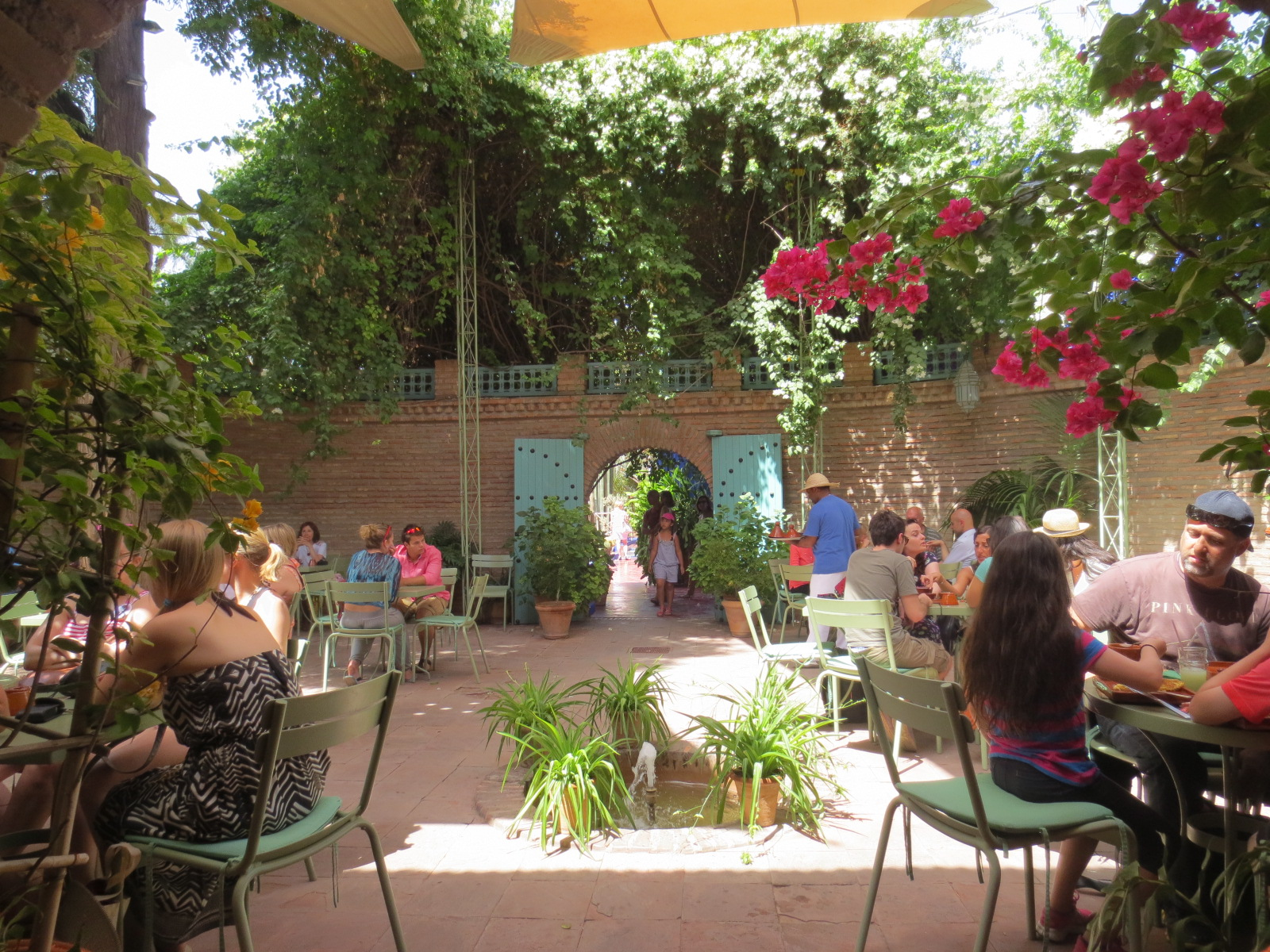 Majorelle Garden